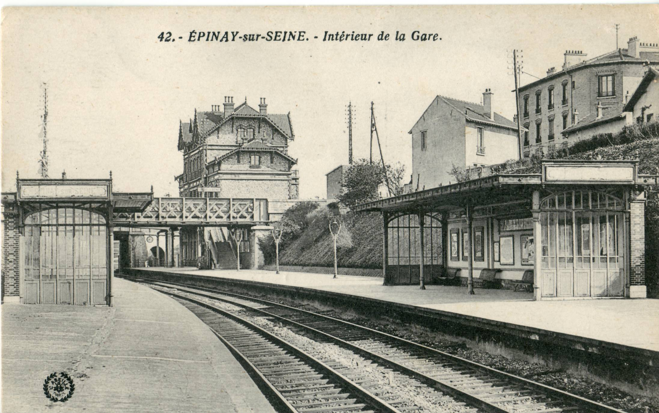 Carte postale ancienne éditée par Abeille, N° 42 Épinay-sur-Seine : La gare : intérieur de la Gare d'Epinay-sur-Seine (actuel RER C) (avec au second plan le pont supportant les lignes du Chemin de fer de Grande Ceinture))